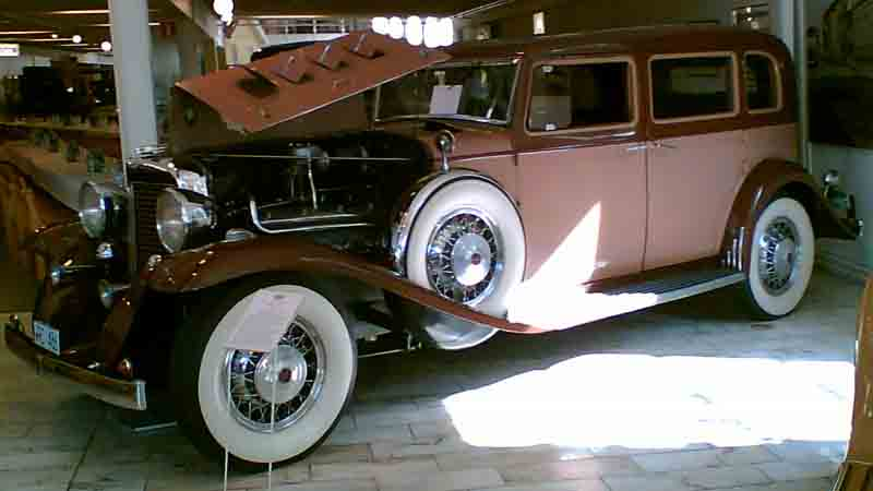 Marmon Series 16 4-Door Sedan 1933